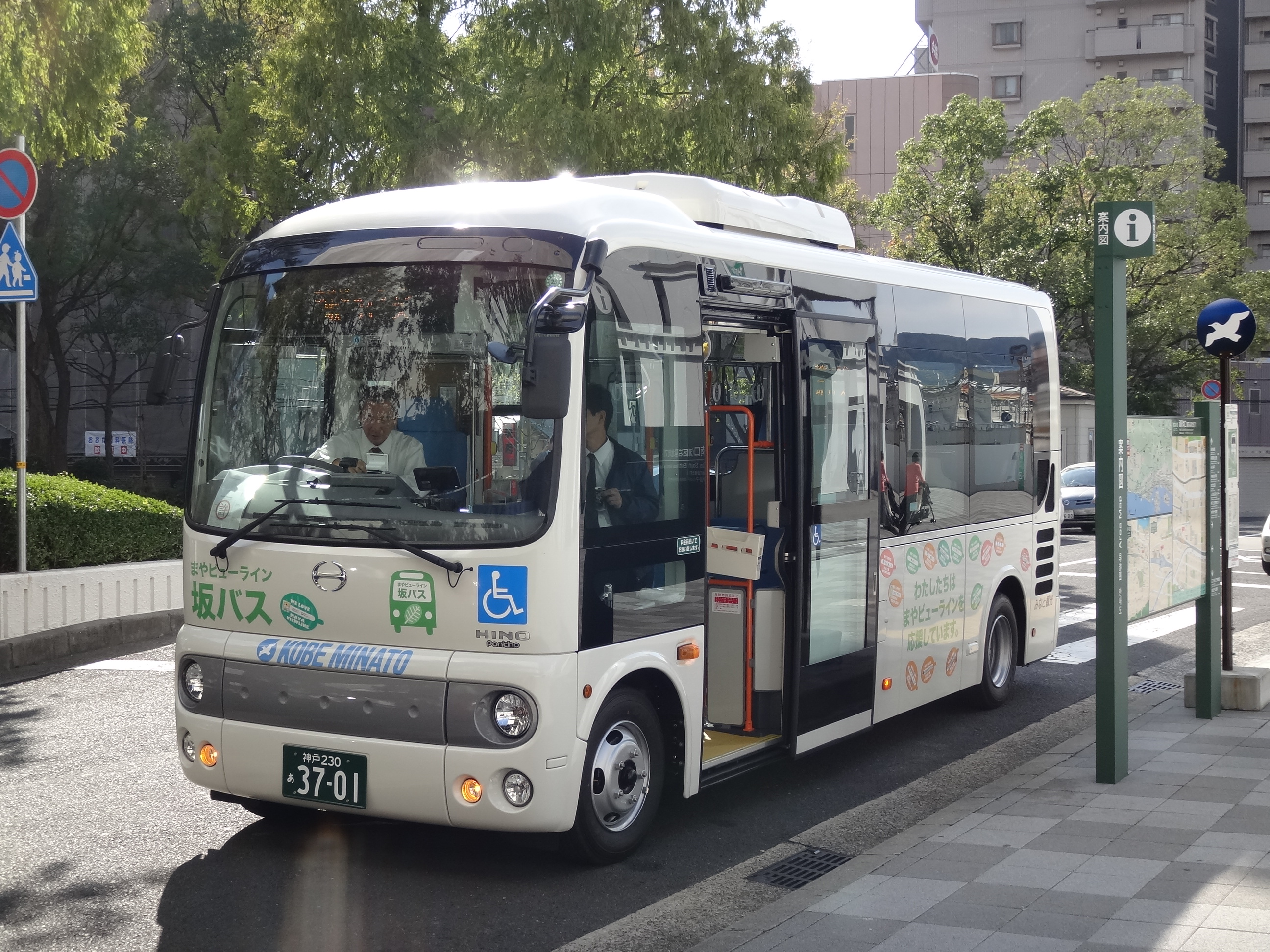 神戸みなと観光バスの「坂バス」仕様車両「日野・ポンチョ」